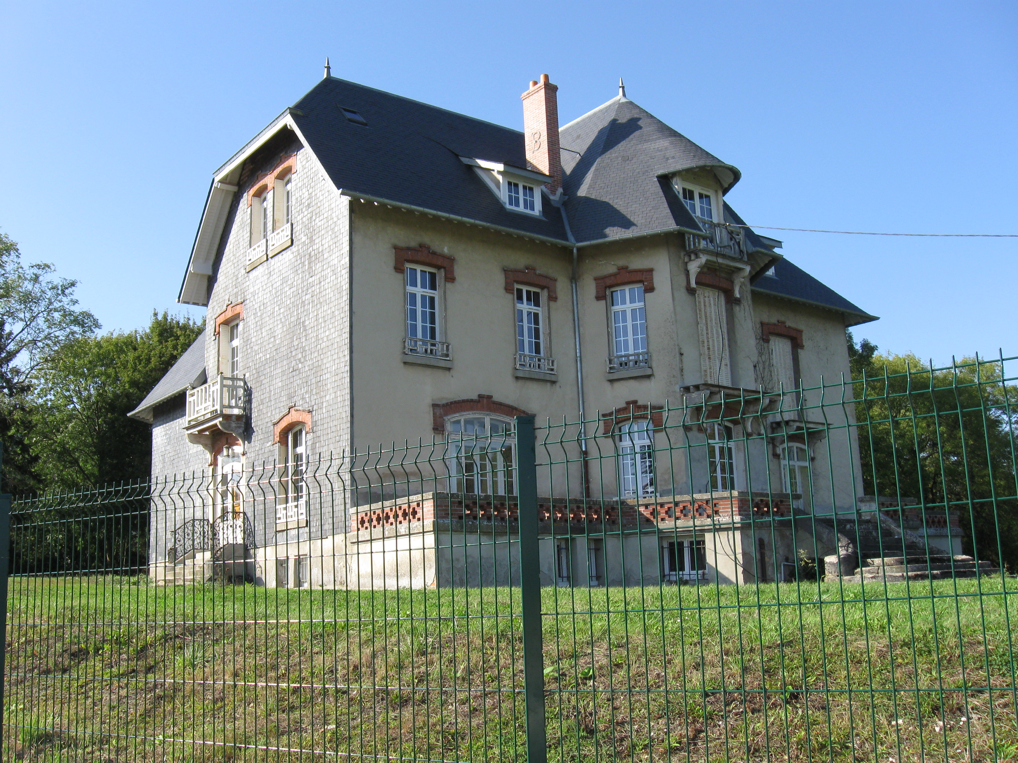 Villa La Grimpette, Monthyon. (Seine-et-Marne, région Île-de-France).